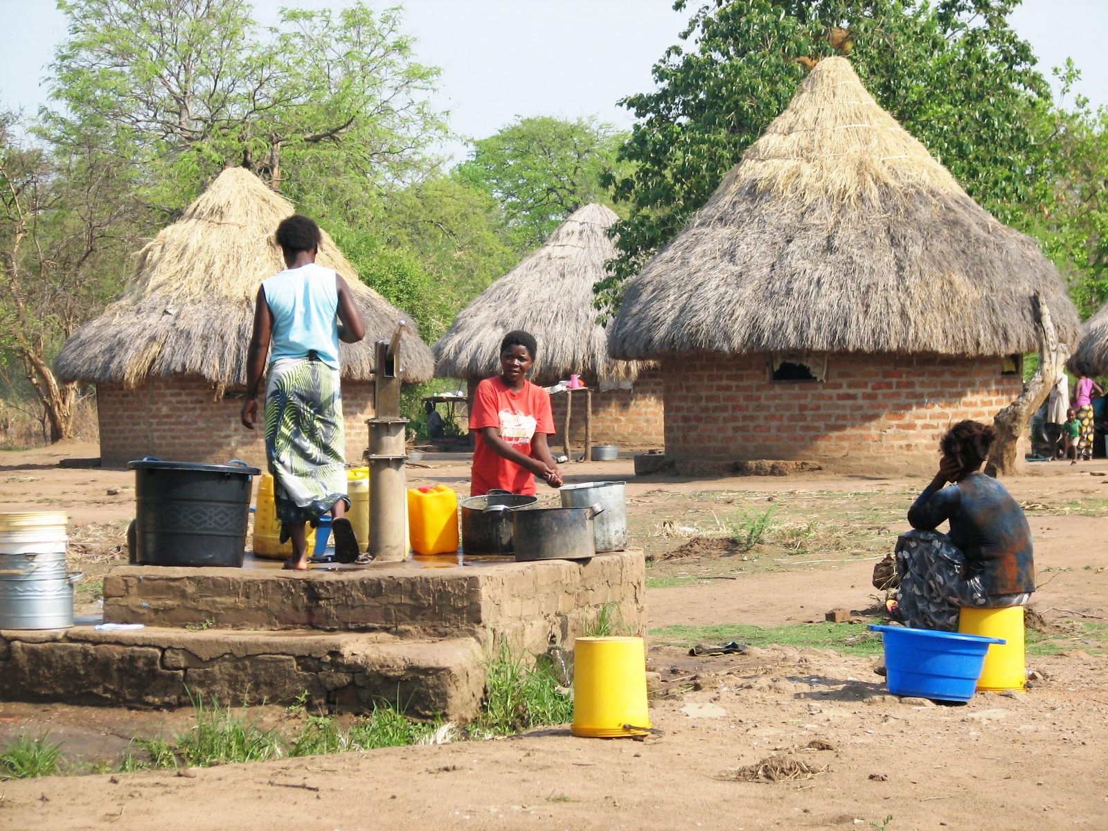 שאיבת מים בכפר באזור שמורת לואנגה בזמביה Luangwa This is an image of food from Zambia